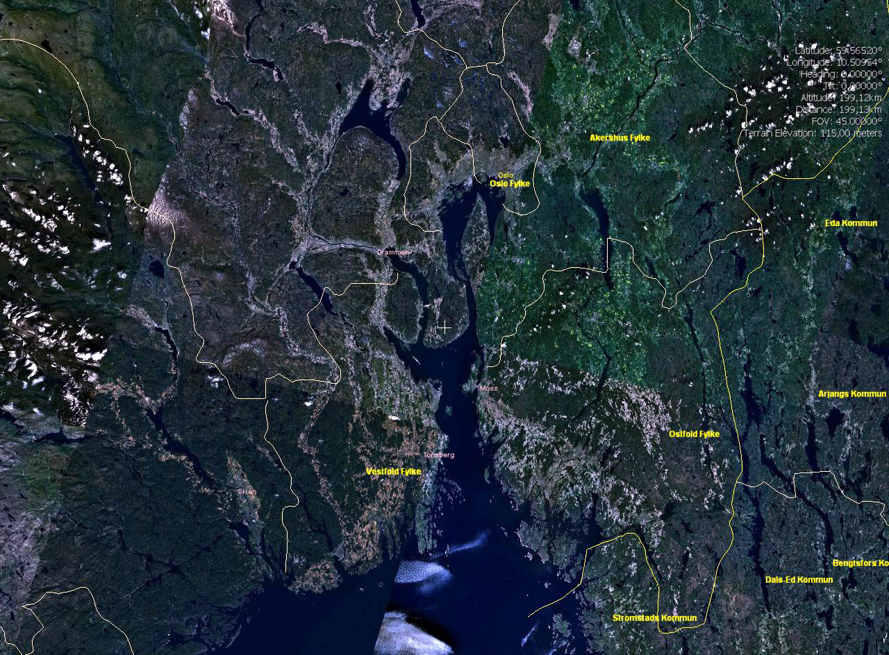 Satelittbilde over Oslofjorden som «screenshot» fra NASA's «WorldWind» I henhold til NASA's politikk er slike bilder «public domain»